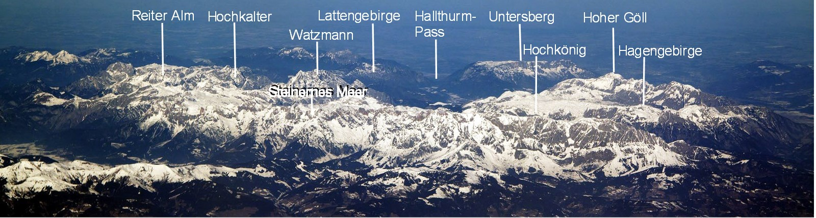 Berchtesgadener Alpen (Luftaufnahme); ergänzt um mit Linien zugeordneten Bezeichnungen ihrer neun Gebirgsstöcke.